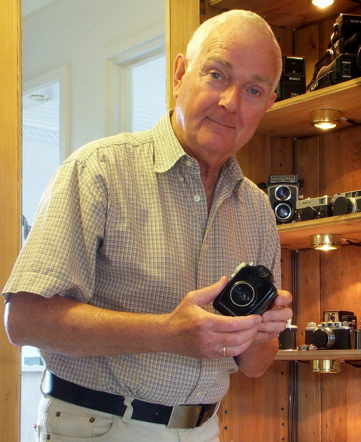 Fotograf Holger Ellgaard med sin första kamera, en Bilora "Boy Box"